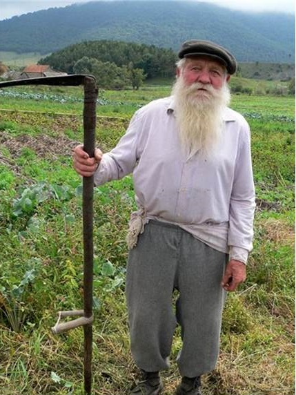 Մոլոկան տղամարդկանց հանդերձանքը